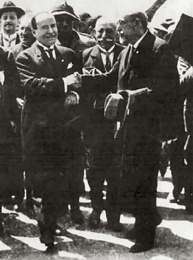 Filippo Genovesi